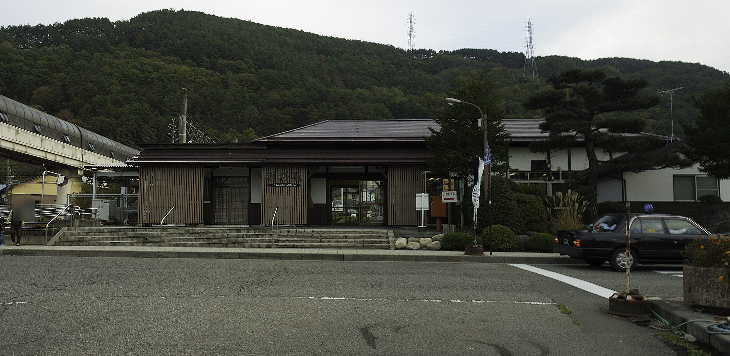 東日本旅客鉄道株式会社篠ノ井線明科駅駅舎（リニューアル後）